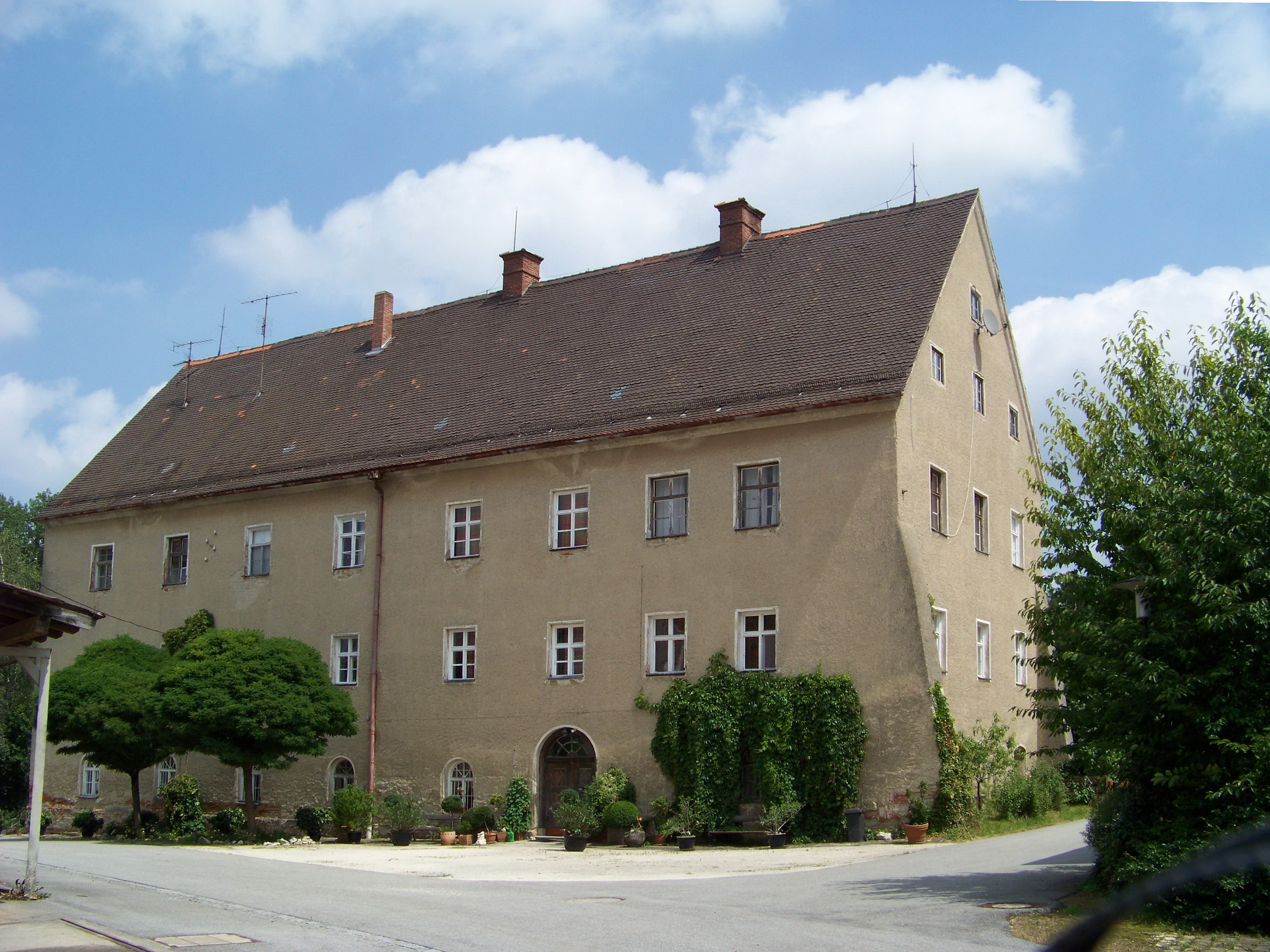 Mallersdorf-Pfaffenberg, Oberellenbach 501. Schloss, Satteldachbau mit Putzbandgliederung und drei stichbogigen Aufzugsöffnungen, Weiheranlage zu zwei Flügeln, wohl 17. Jh., 1756 umgebaut; zugehörige Sommerkeller, südöstlich des Schlosses.